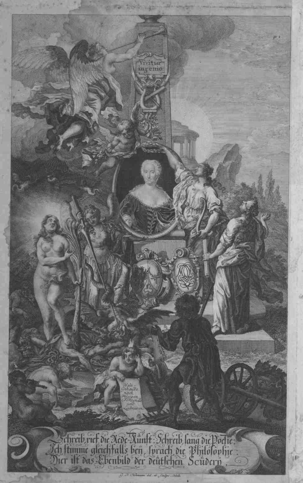 Christiana Mariana von Ziegler (1695-1760) Schreib, rief die Rede-Künst: Schreib, sang die Poesie Ich stimme gleichfalls beÿ, sprach die Philosophie Hier ist das Ebenbild der deütschen Scüderÿ.